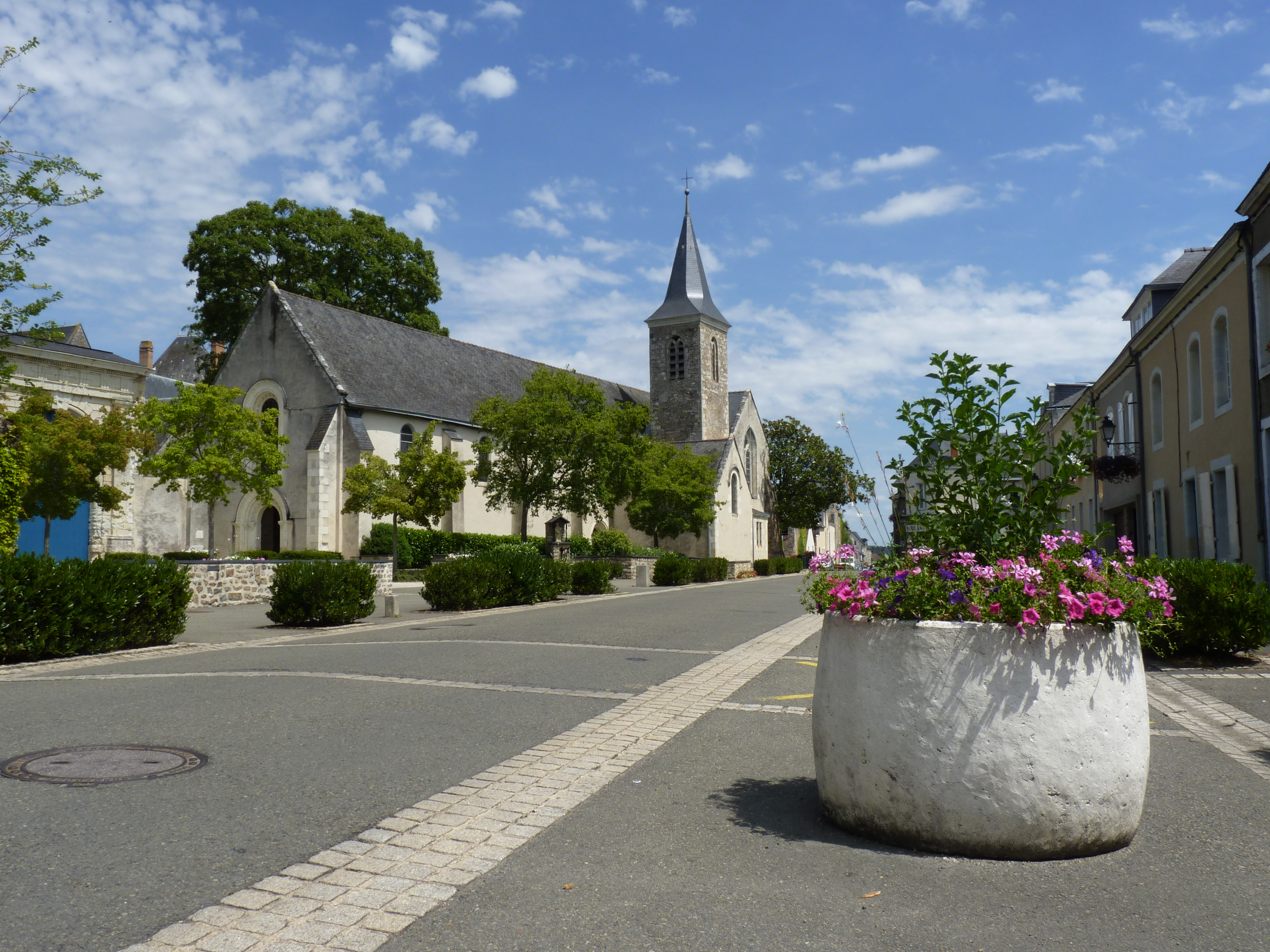 Sarthe - Bourg de Solesmes